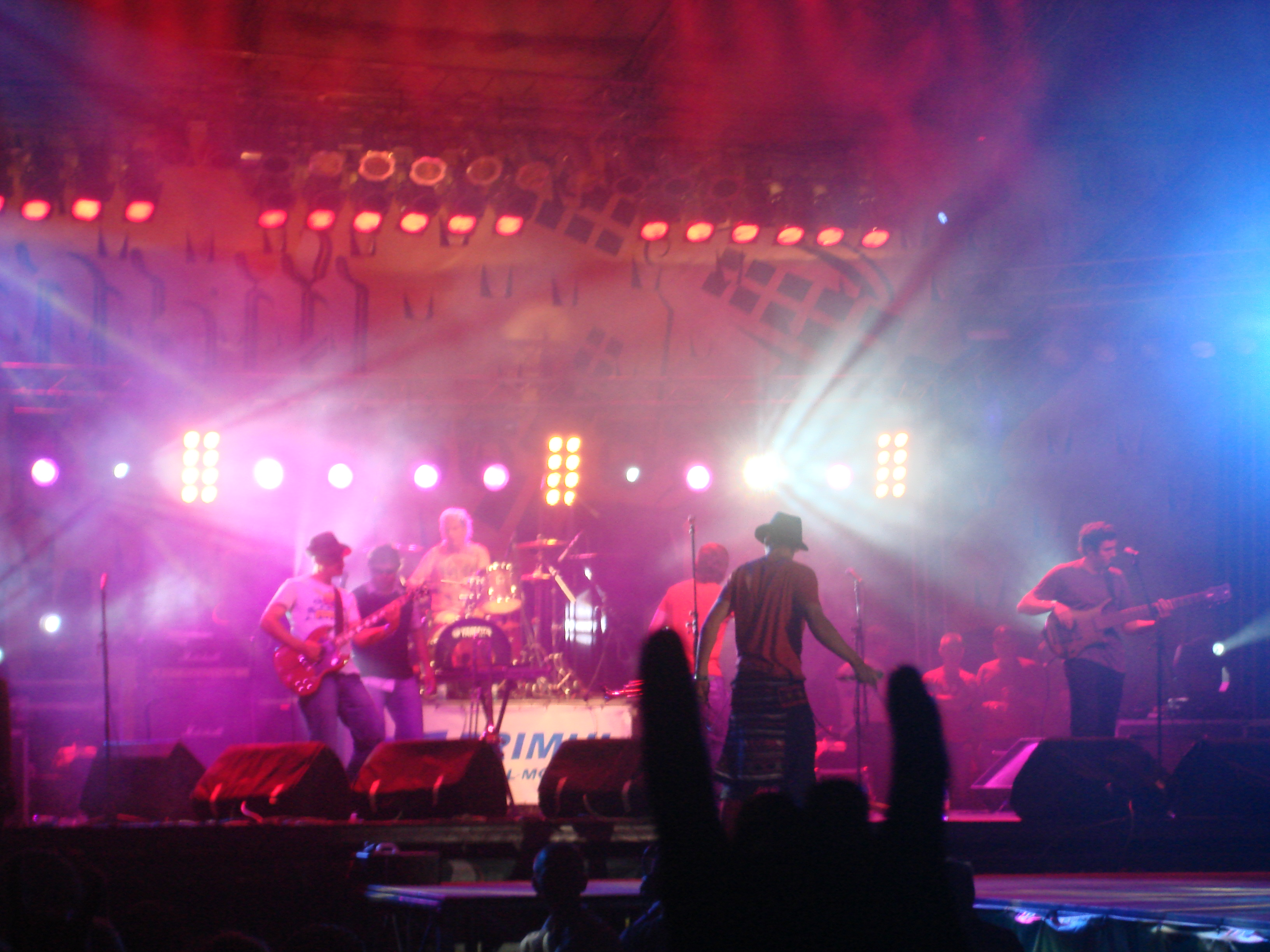 Группа "Здоб ши Здуб" на фестивале "Старый мельник" в 2006 году.